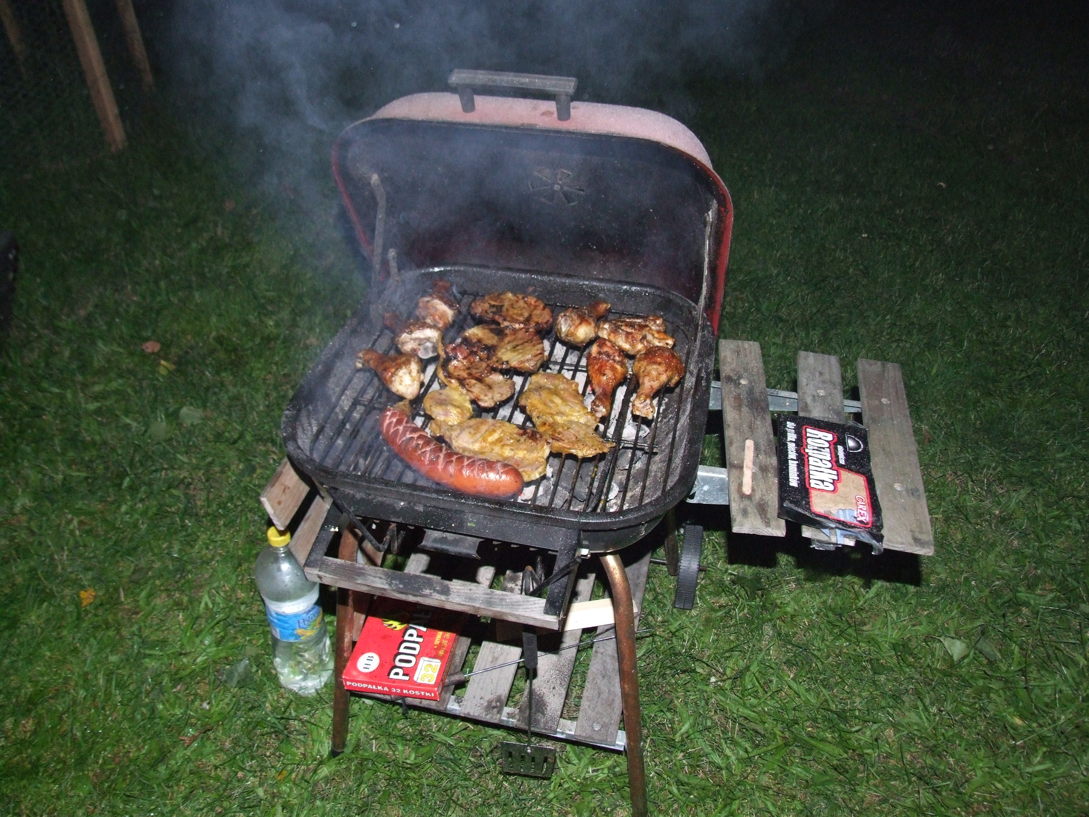 grill na Malarach